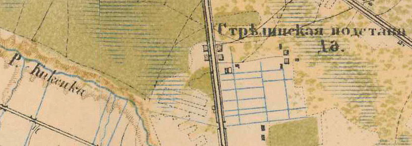 Деревня Новоселье на карте 1885 года.